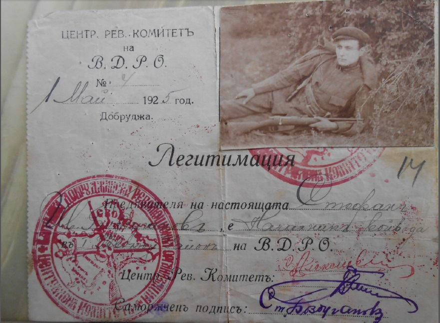 Легитимация на Стефан Боздуганов